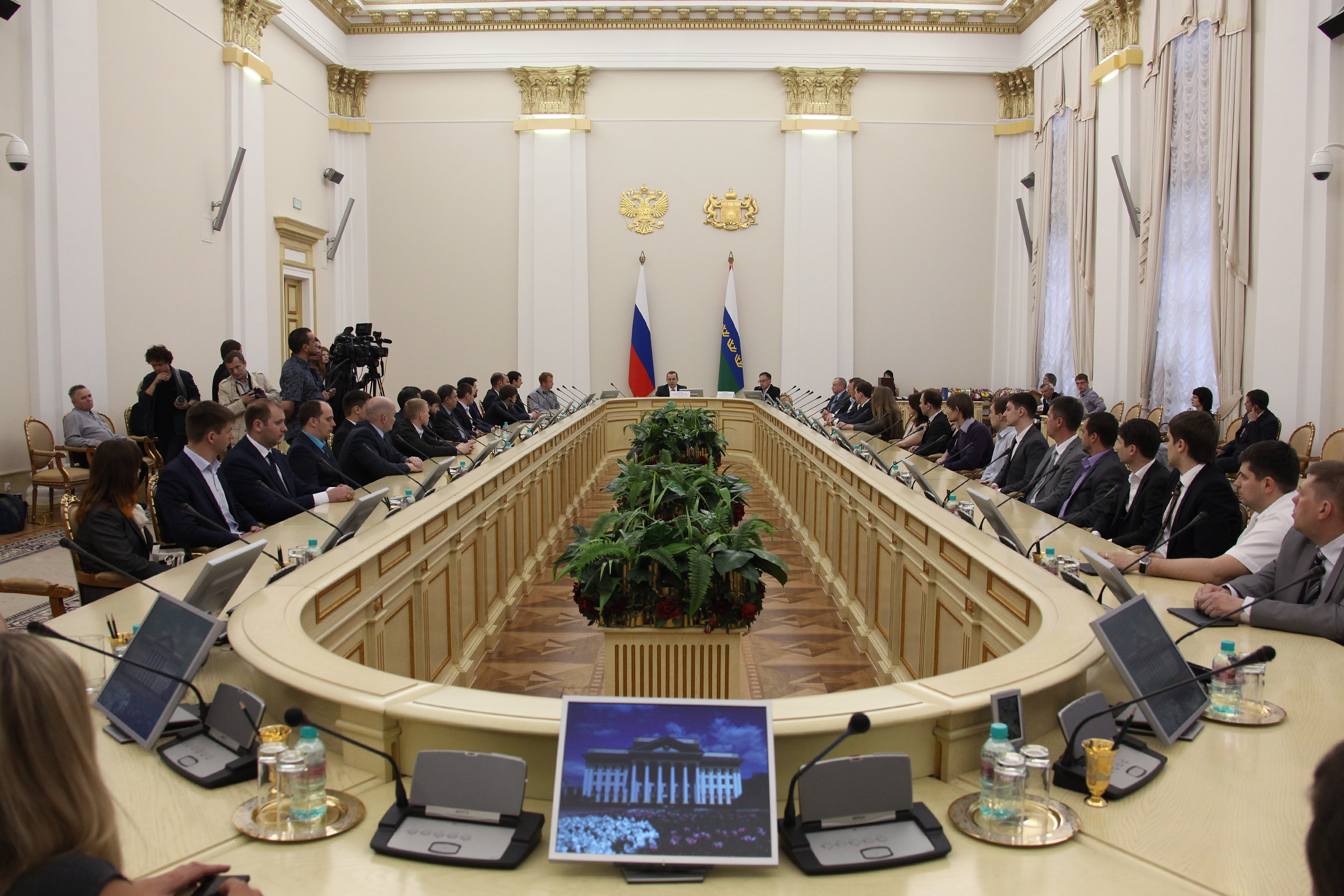 Сотрудники ООО «ТюменНИИгипрогаз» на церемонии награждения лауреатов конкурса «Инженер года – 2015». г. Тюмень, Правительство Тюменской области.